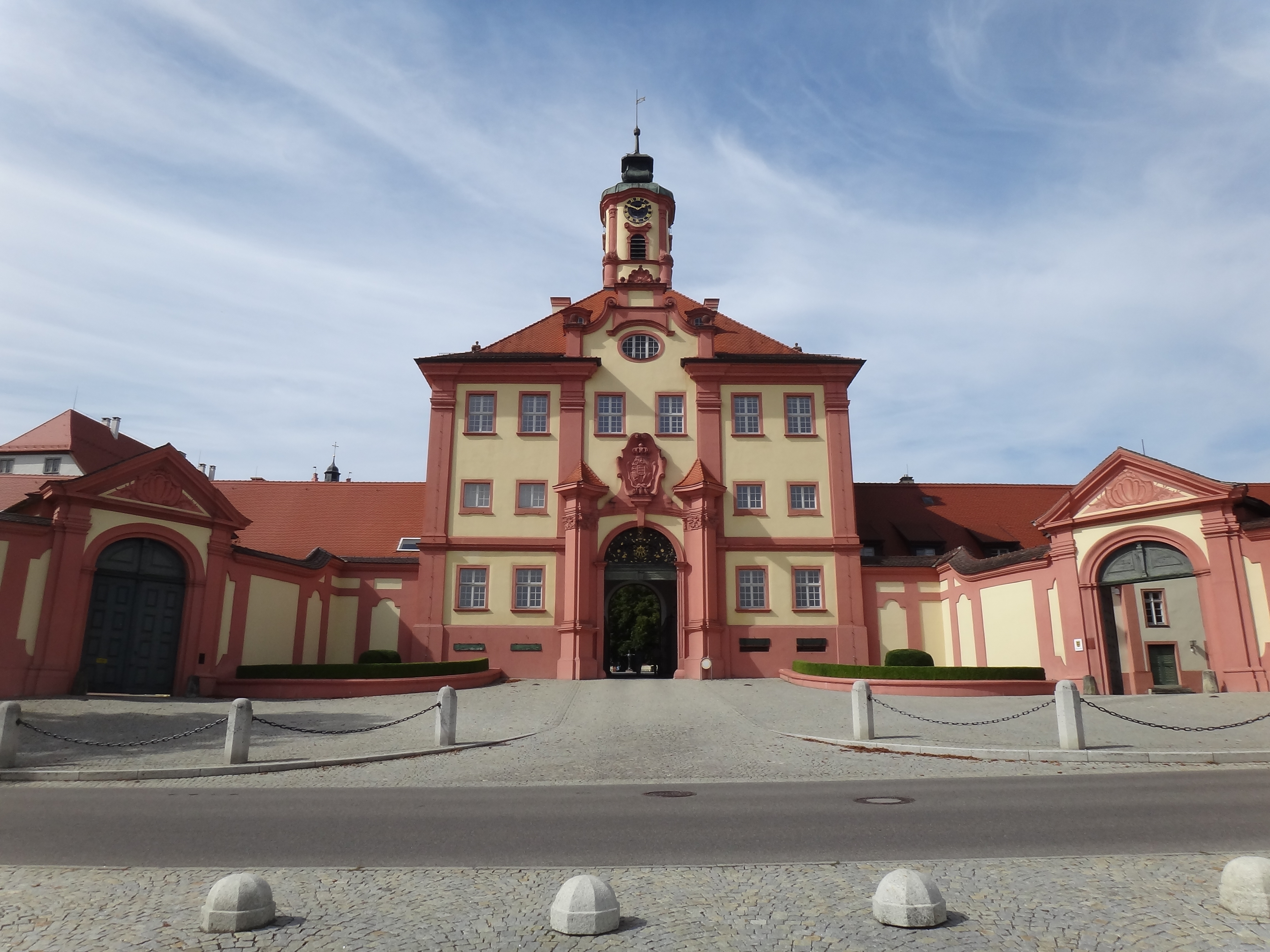 Torgebäude Schloss Altshausen